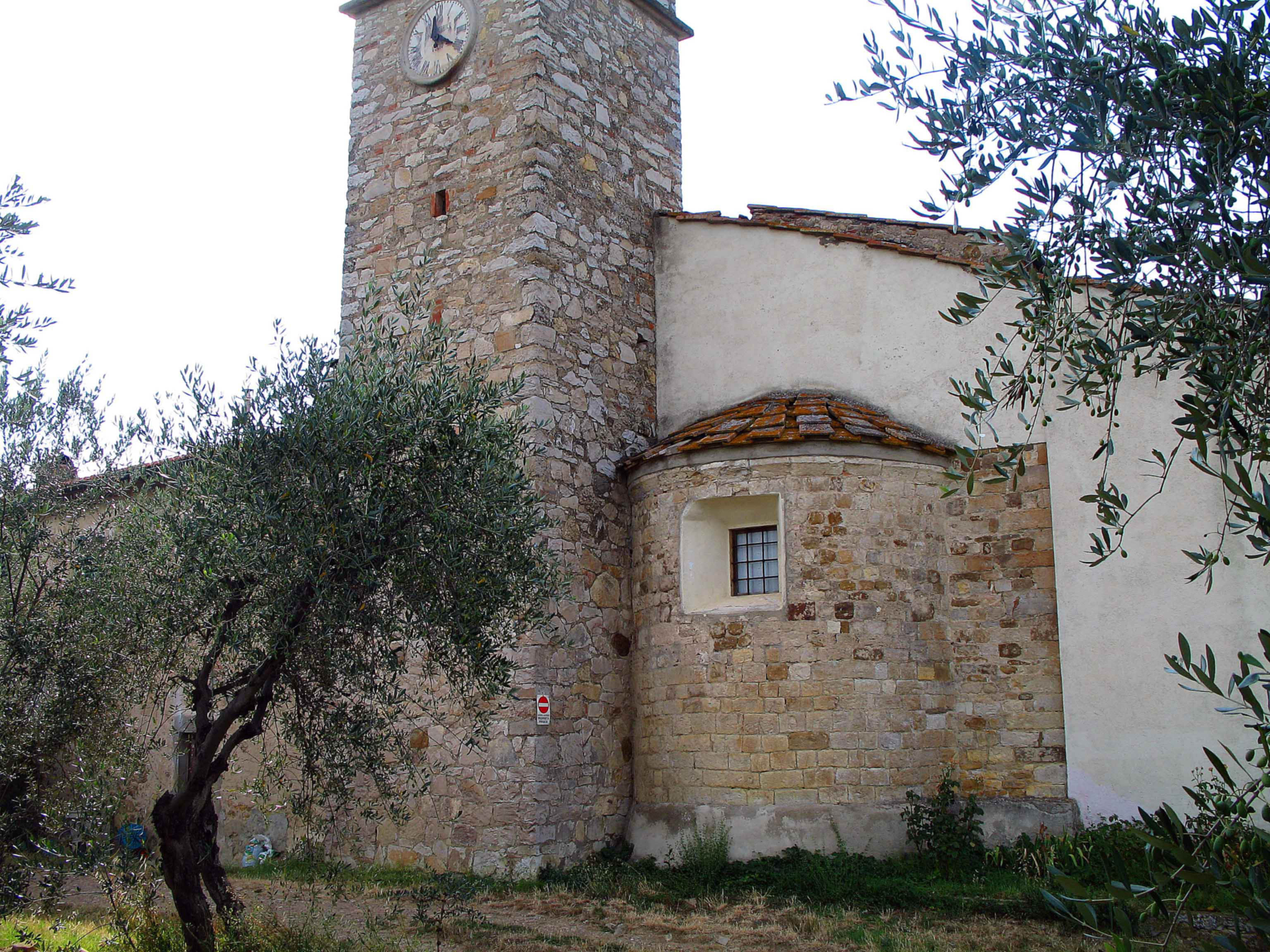 Chiesa di San Colombano in Collina - Abside - San Casciano in Val di Pesa